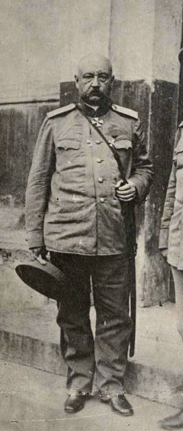 Генерал Николай Николаевич Юденич